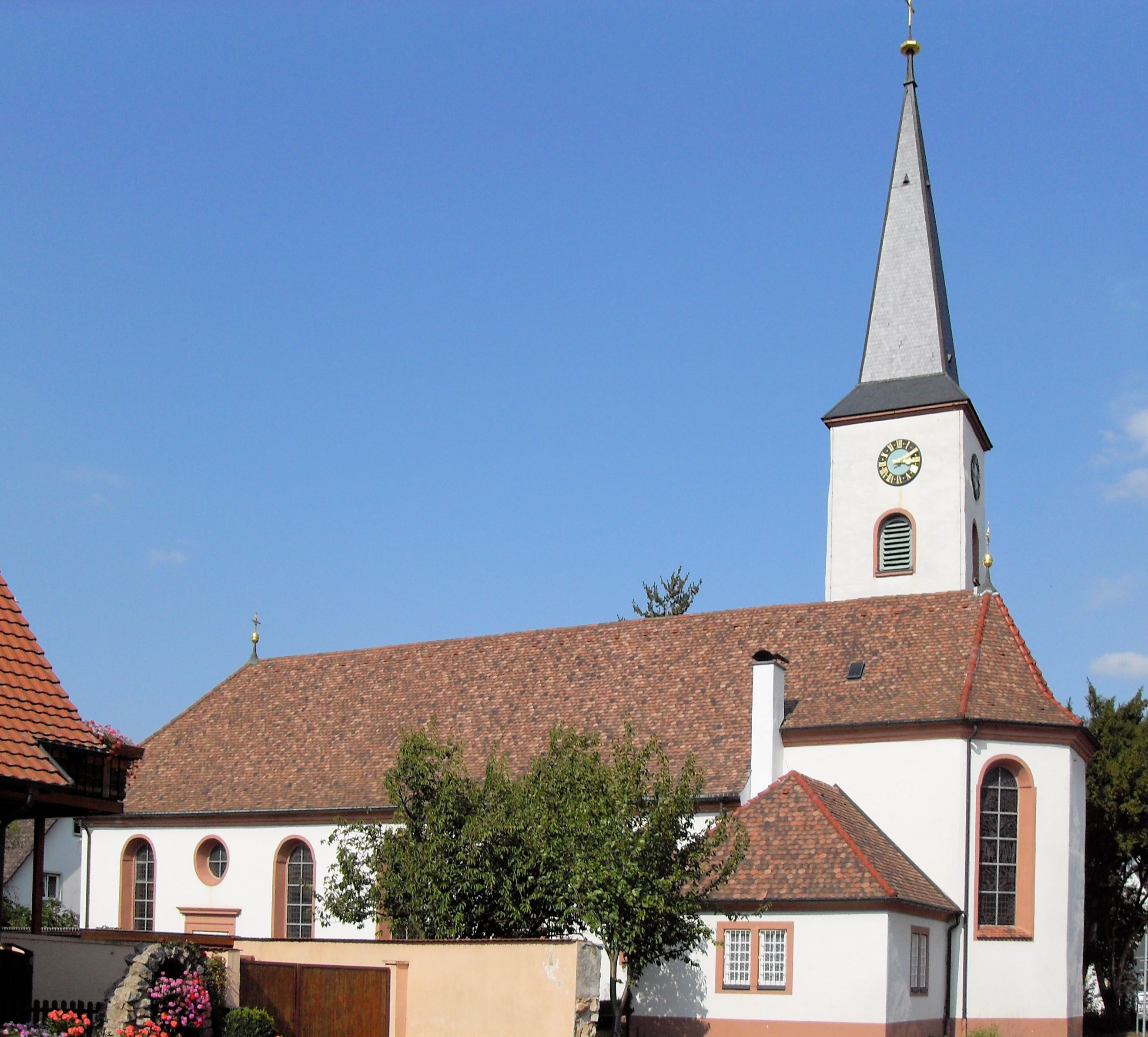 Pfarrkirche St. Stefan in Oberrimsingen